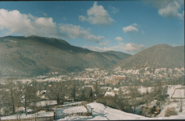 Це файл завантажений мною